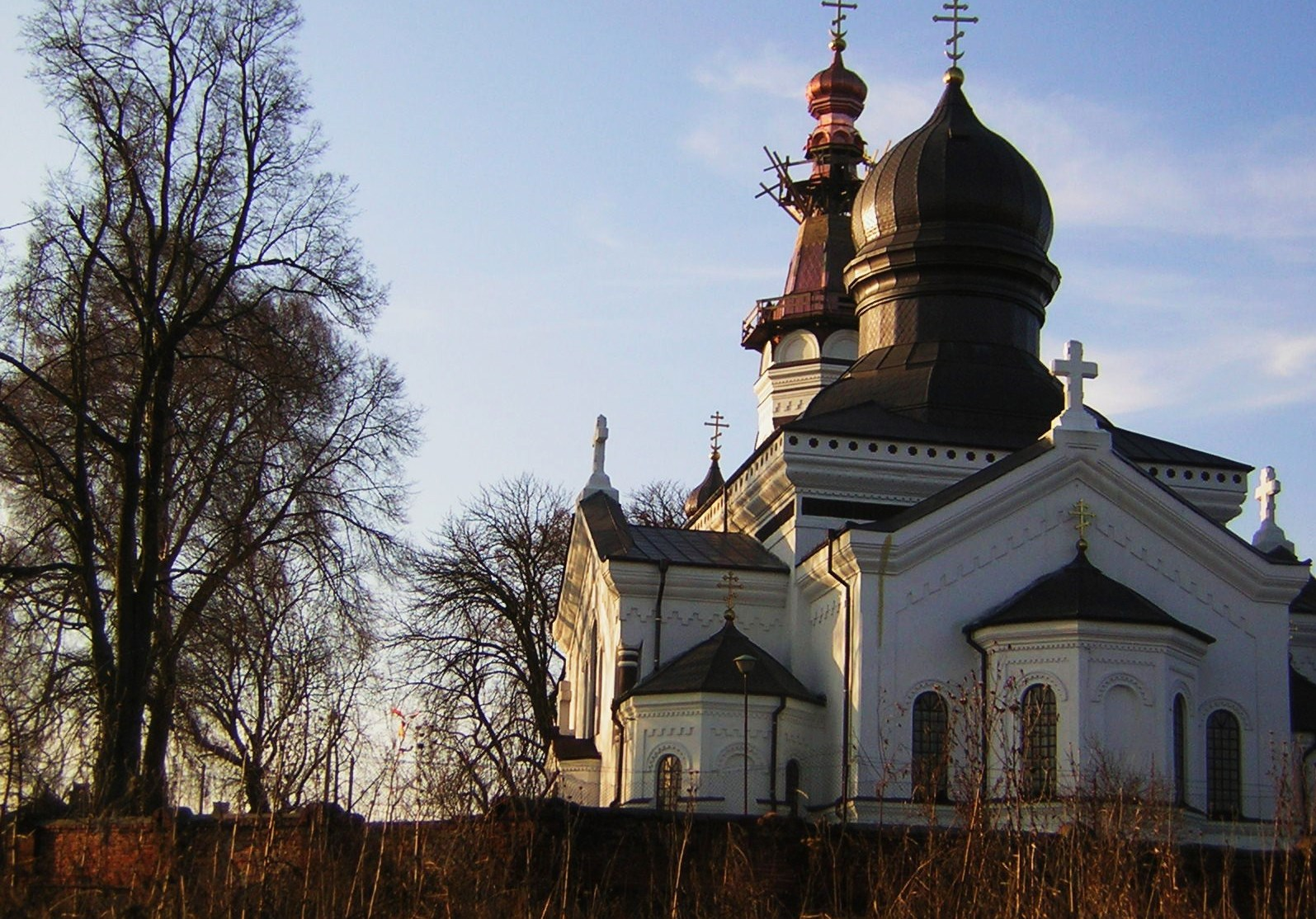 Dawna greko-katolicka (obecnie cerkiew prawosławna we Włodawie).